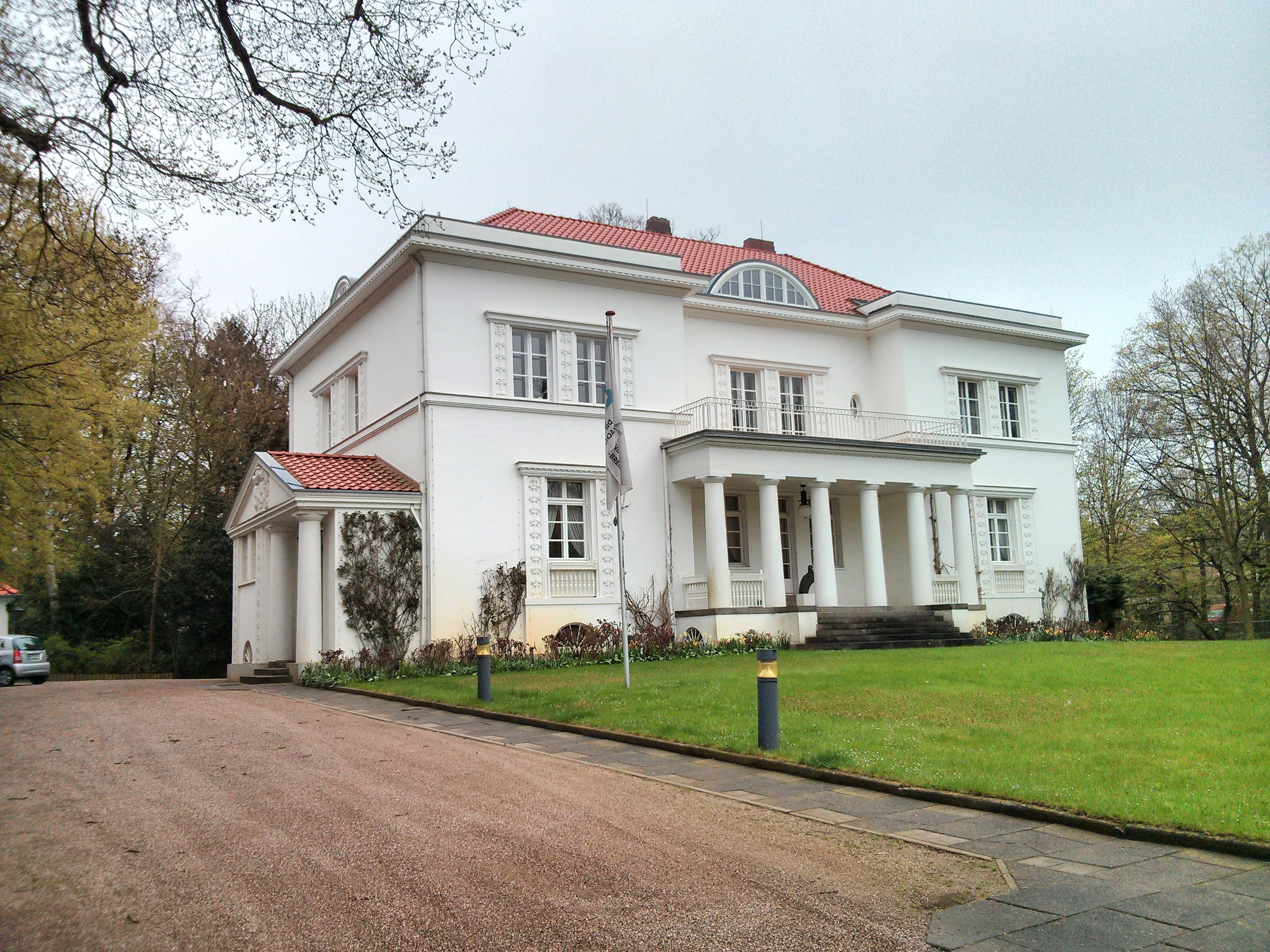 Villa Bünemann in Bremen, Bürgermeister-Spitta-Allee 18 Das abgebildete Objekt ist ein geschütztes Kulturdenkmal in der Freien Hansestadt Bremen, mit der Nr. 0217 beim Landesamt für Denkmalpflege registriert.